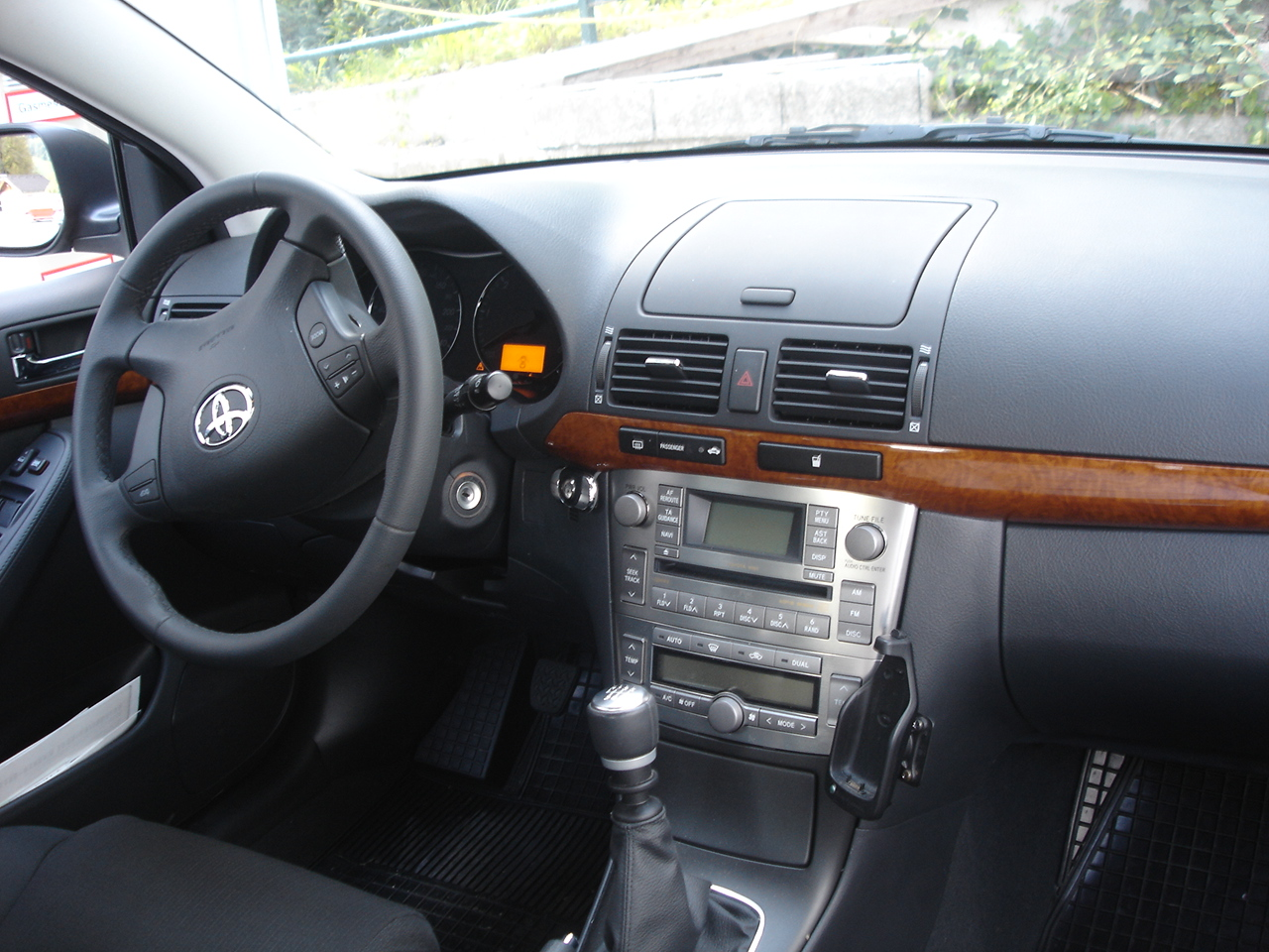 Innenraum eines Toyota Avensis II Generation Facelift